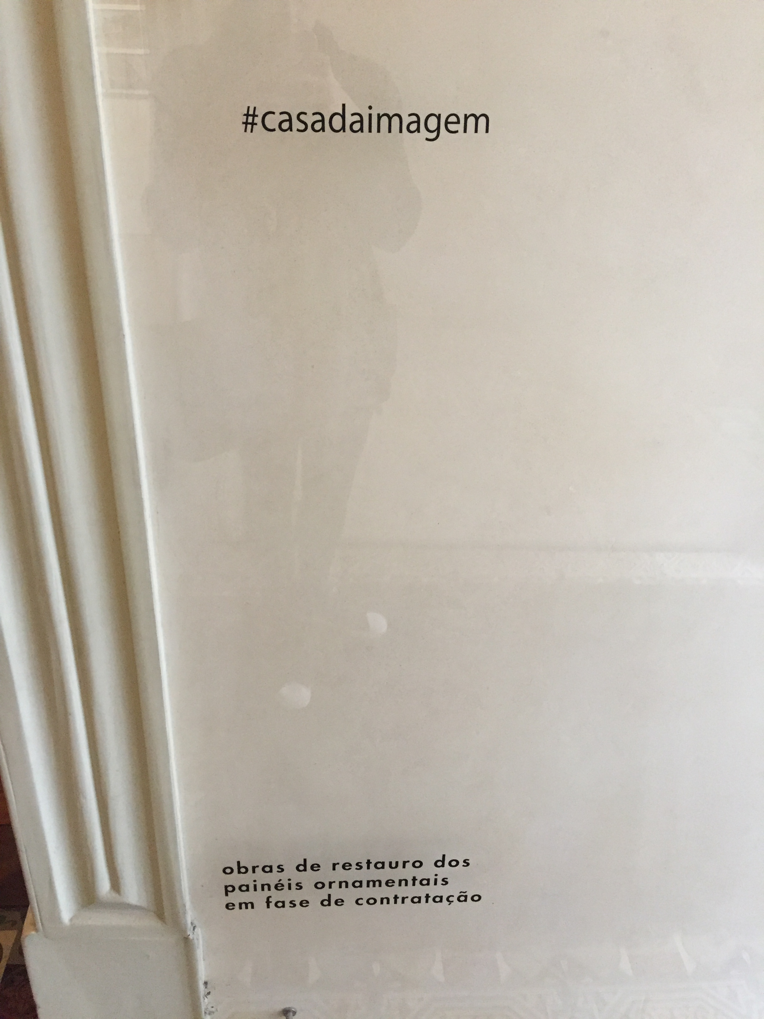 Parede de informação da Casa Número 1, agora denominada de Casa da Imagem.